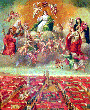 Nuestra Señora de Caracas, imagen tutelar de la ciudad mariana de Santiago de León de Caracas.